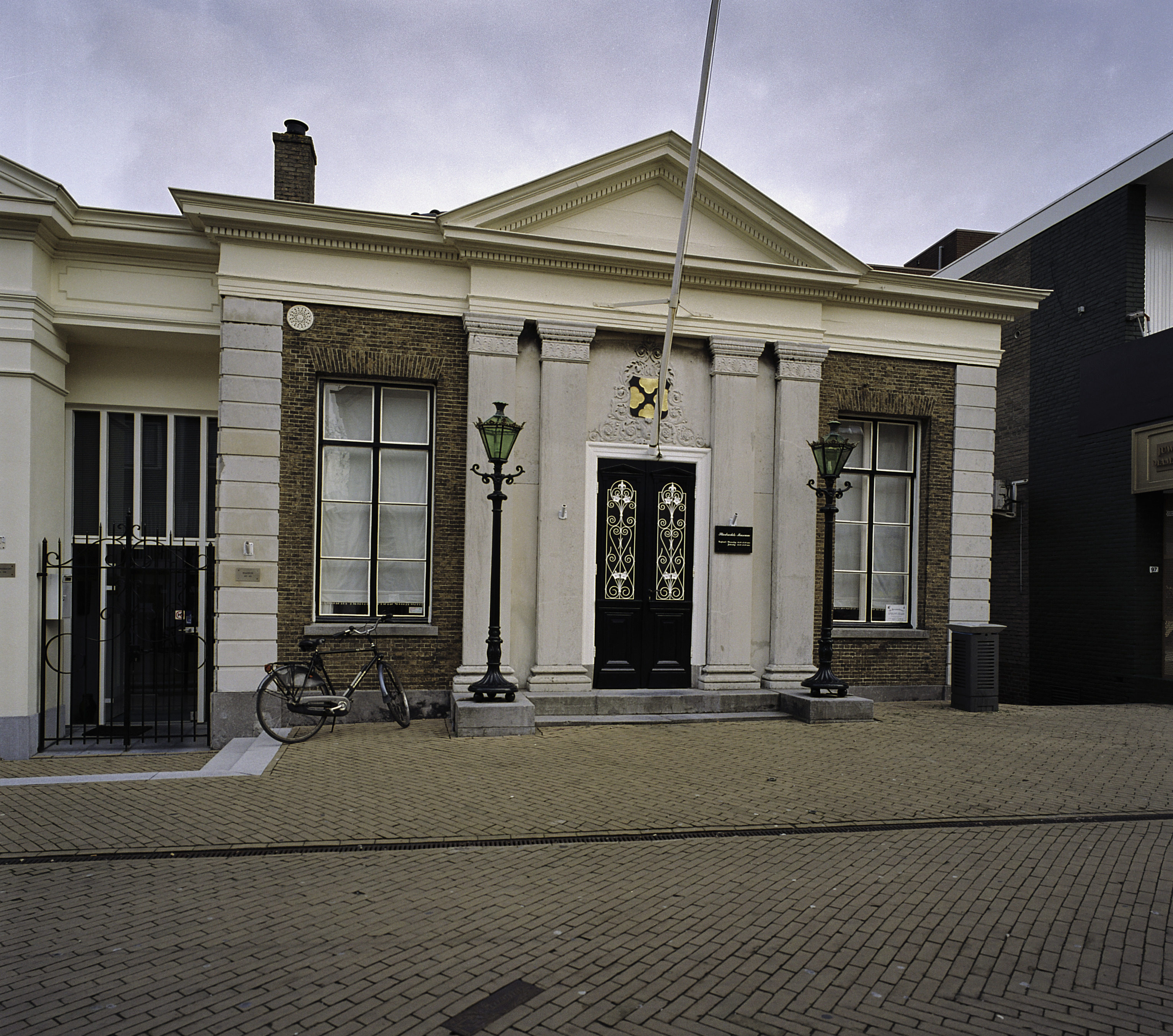 VOORMALIG STADHUIS: Voorgevel met wapensteen boven ingangspartij (opmerking: Gefotografeerd voor Monumenten In Nederland Zuid-Holland)